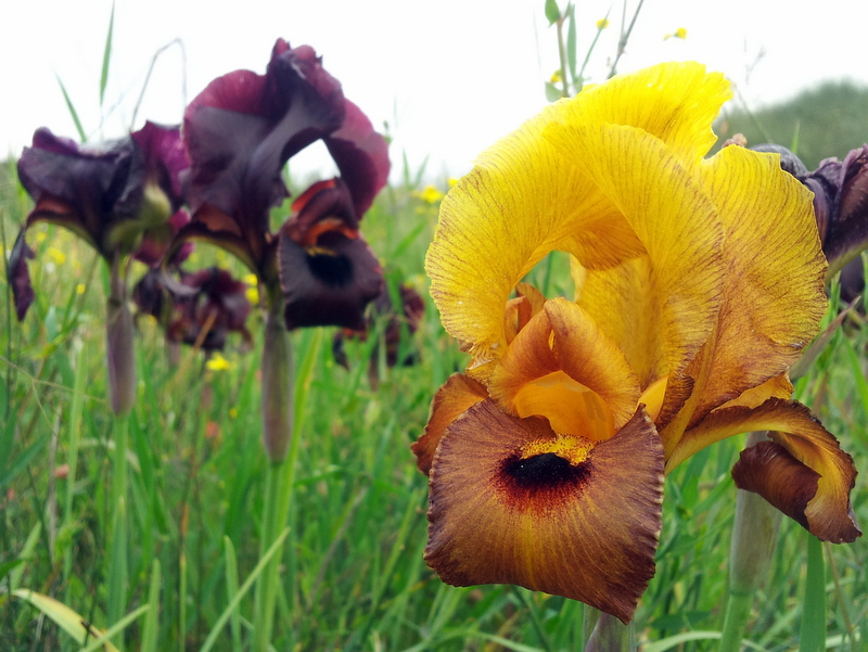 "אירוס זהוב", מוטציה של אירוס הארגמן, על רקע אירוס הארגמן. צולם בשמורת קדימה. 22/2/2013